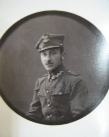 Podporucznik B. Müller